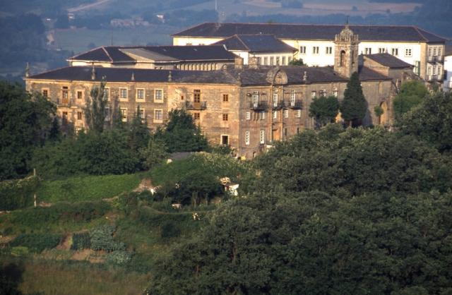 Sarria-Monasterio de la Magdalena2